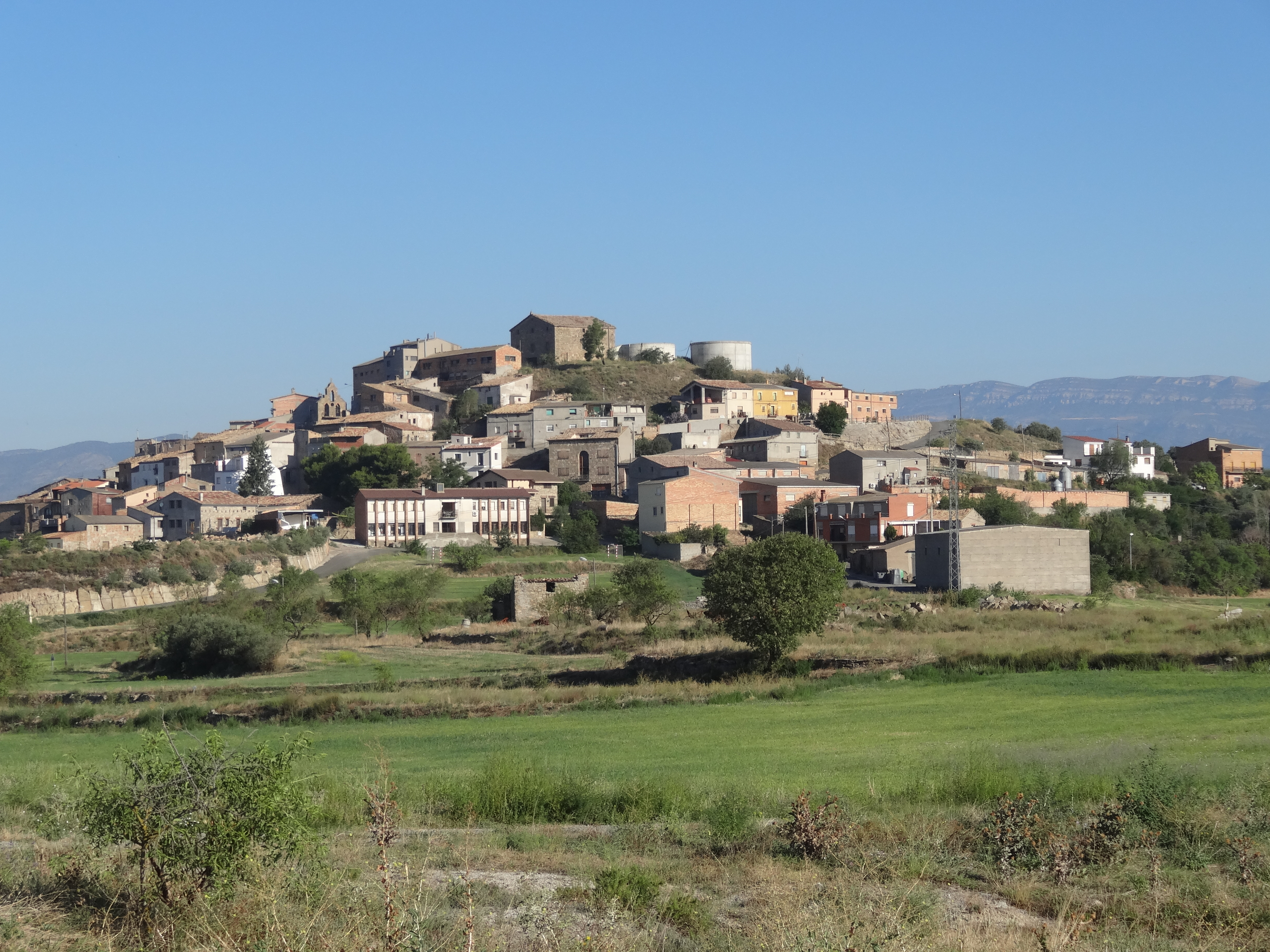 Tudela de Segre vist des del camí que porta a l'ermita de la Santa Fe (municipi d'Artesa de Segre)